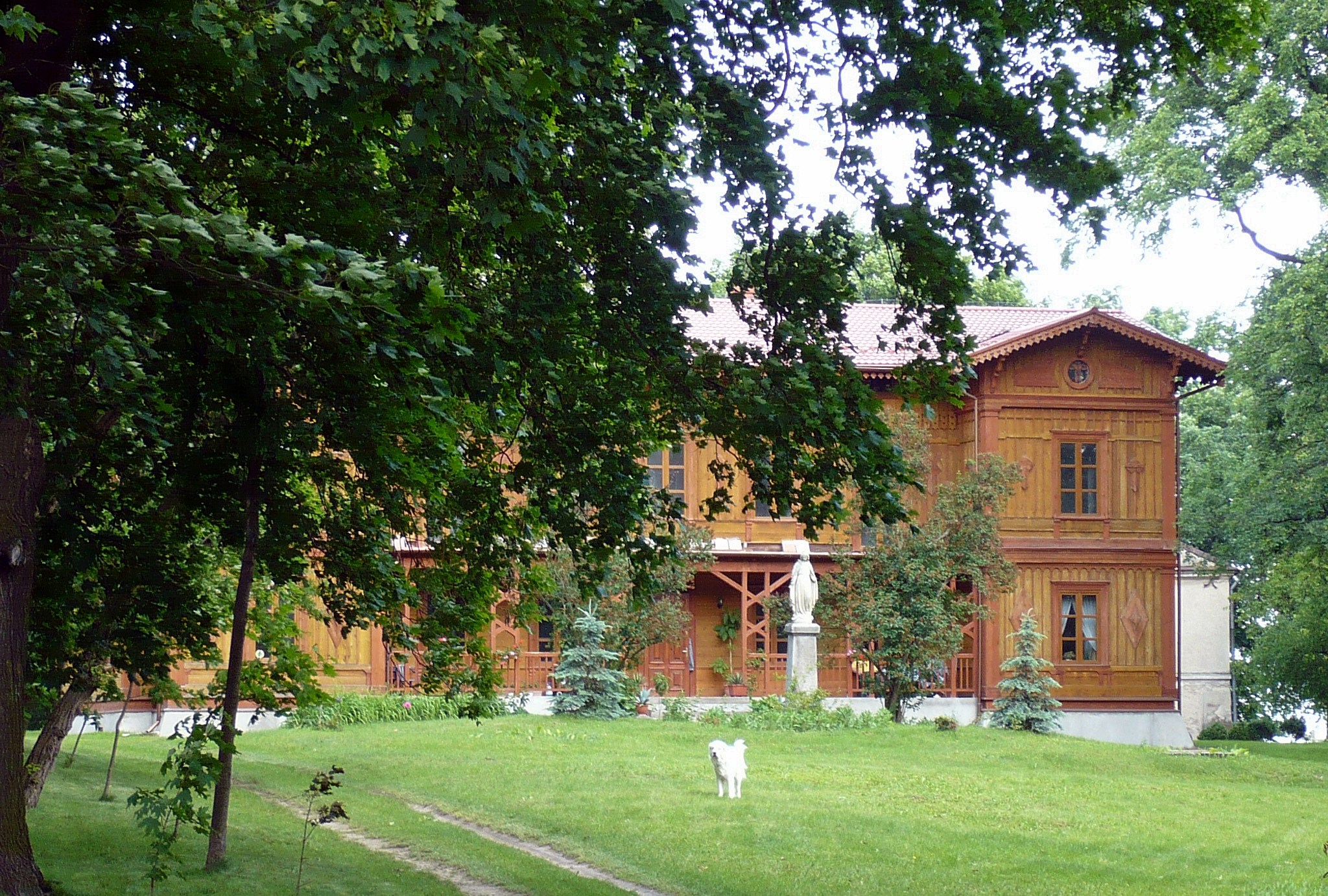 Stan obecny Modrzewiowego Dworku w Mircu.